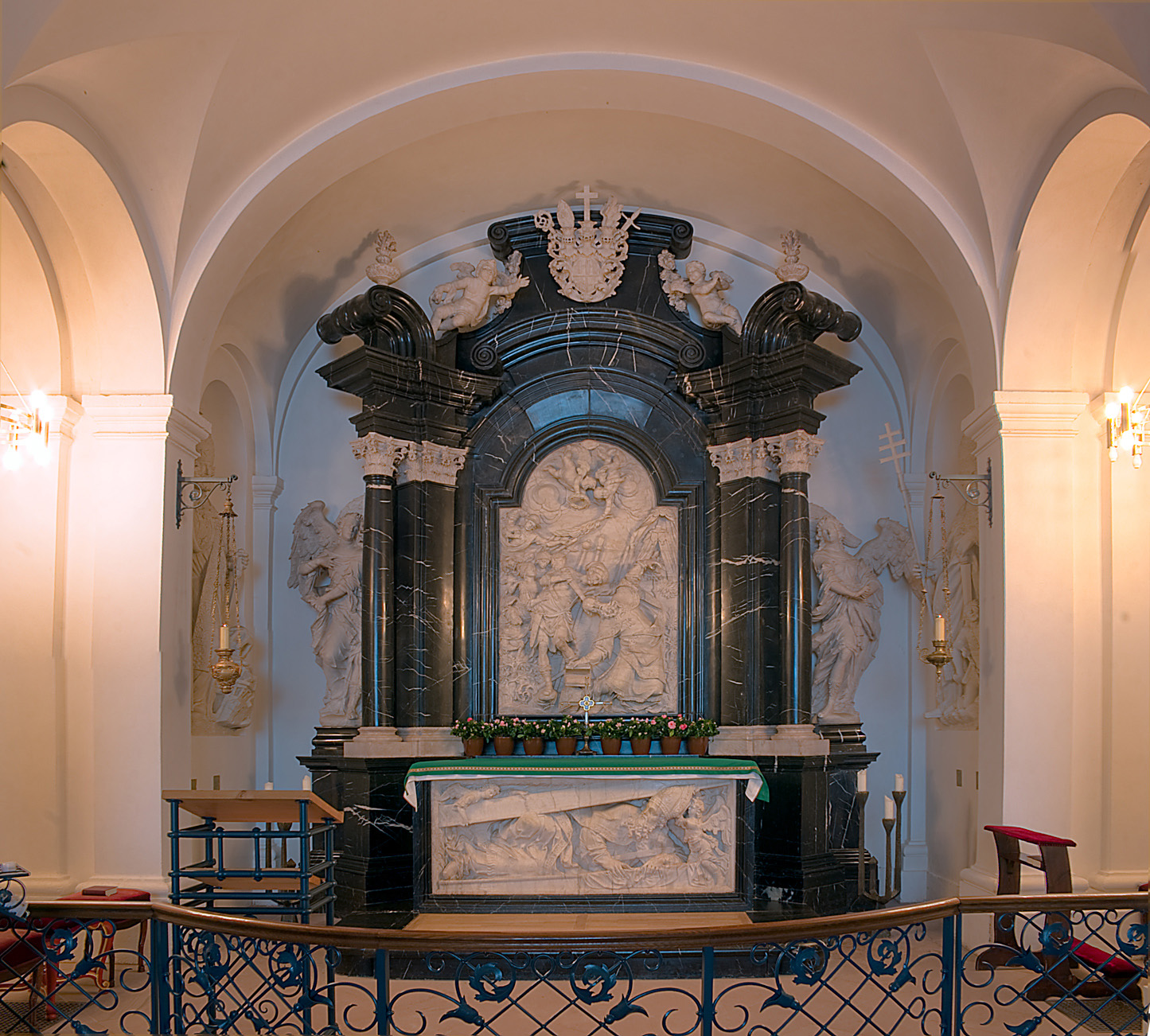 Gruft des heiligen Bonifatius im Fuldaer Dom, Fulda